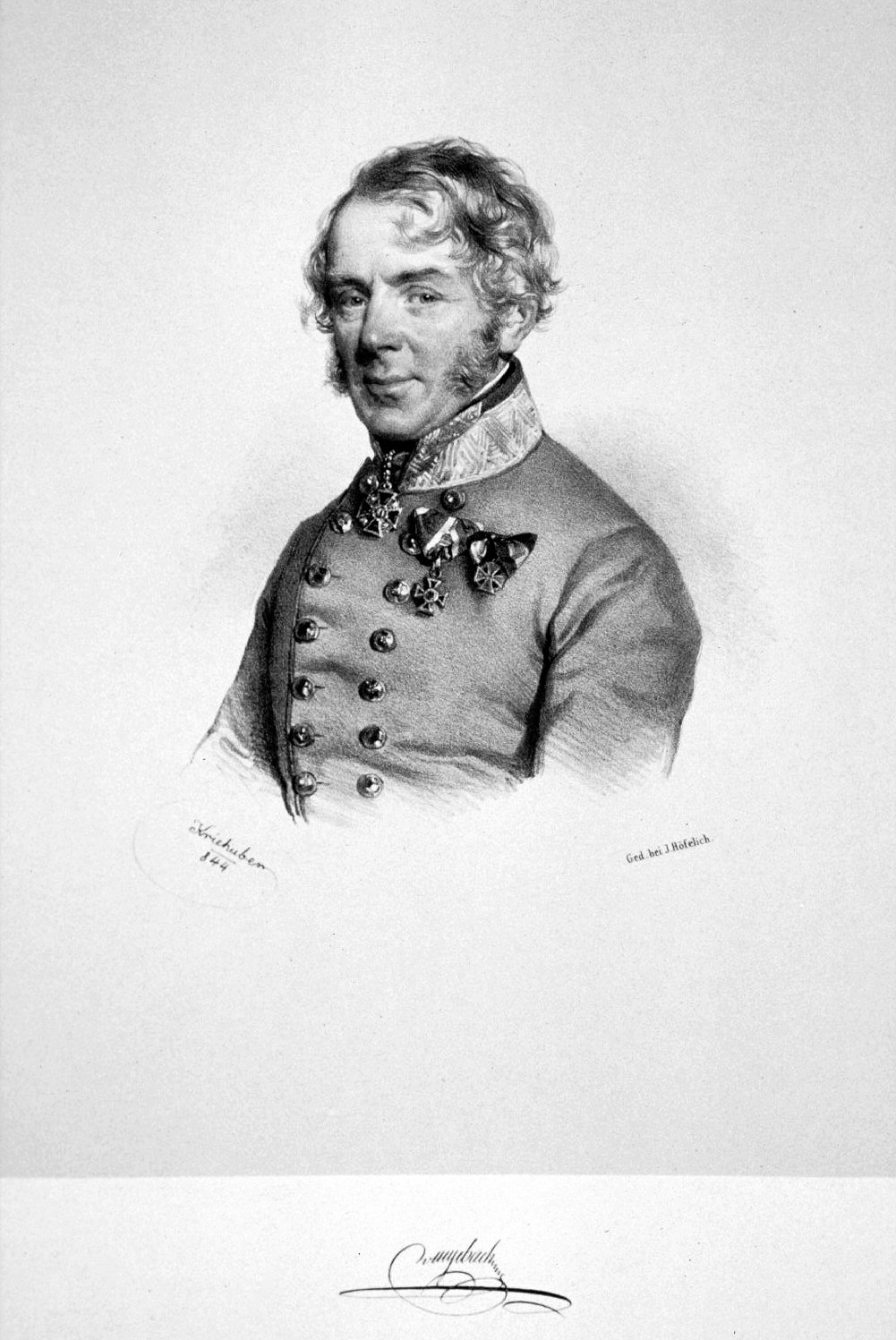 Karl Myrbach Edler von Rheinfeld (1784-1844), k. k. Generalmajor Lithographie von Josef Kriehuber, 1844